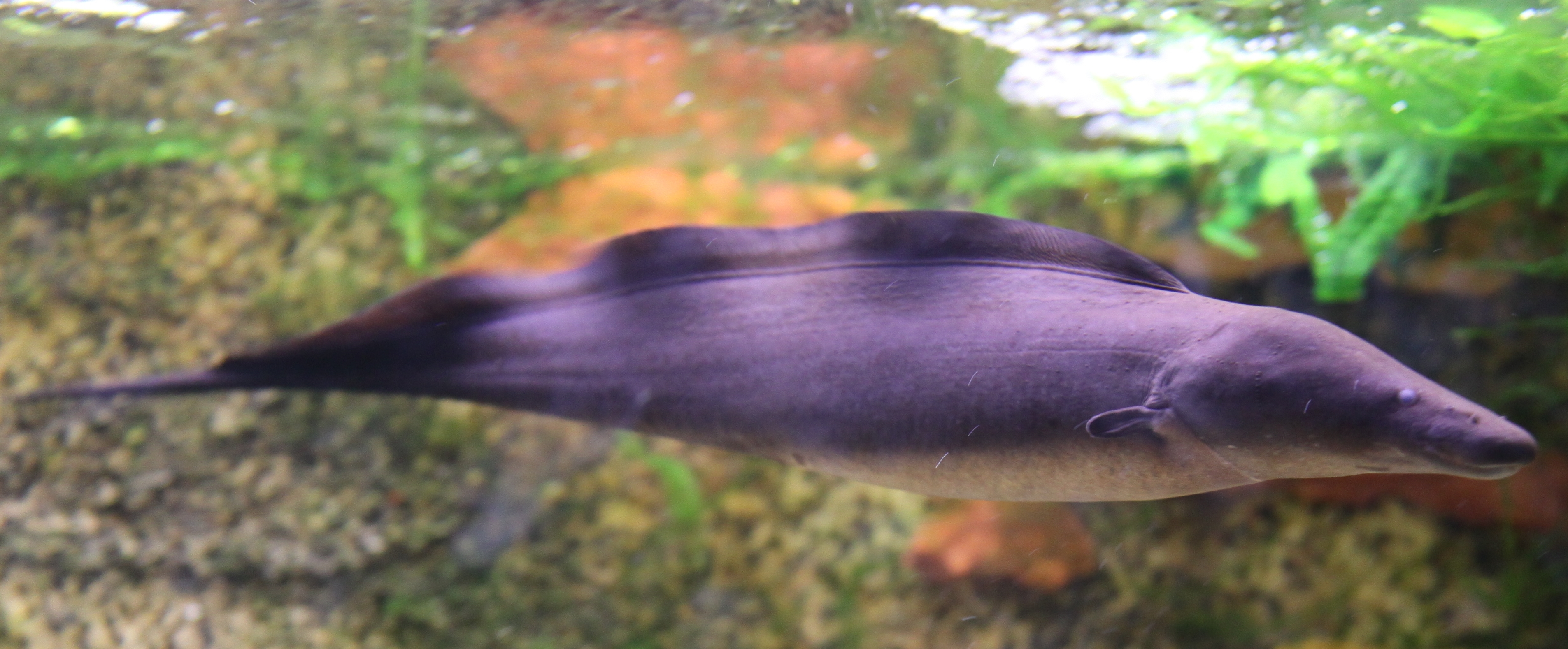 Gymnarque du Nil à l'aquarium tropical de la porte dorée à Paris.